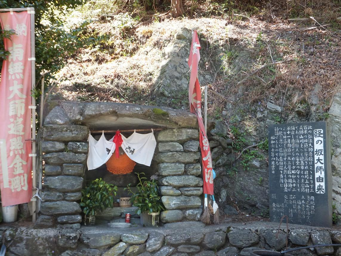 経の坂峠弘法大師尊像と経の坂大師由来石碑（徳島県名西郡神山町、国道193号、経の坂峠）